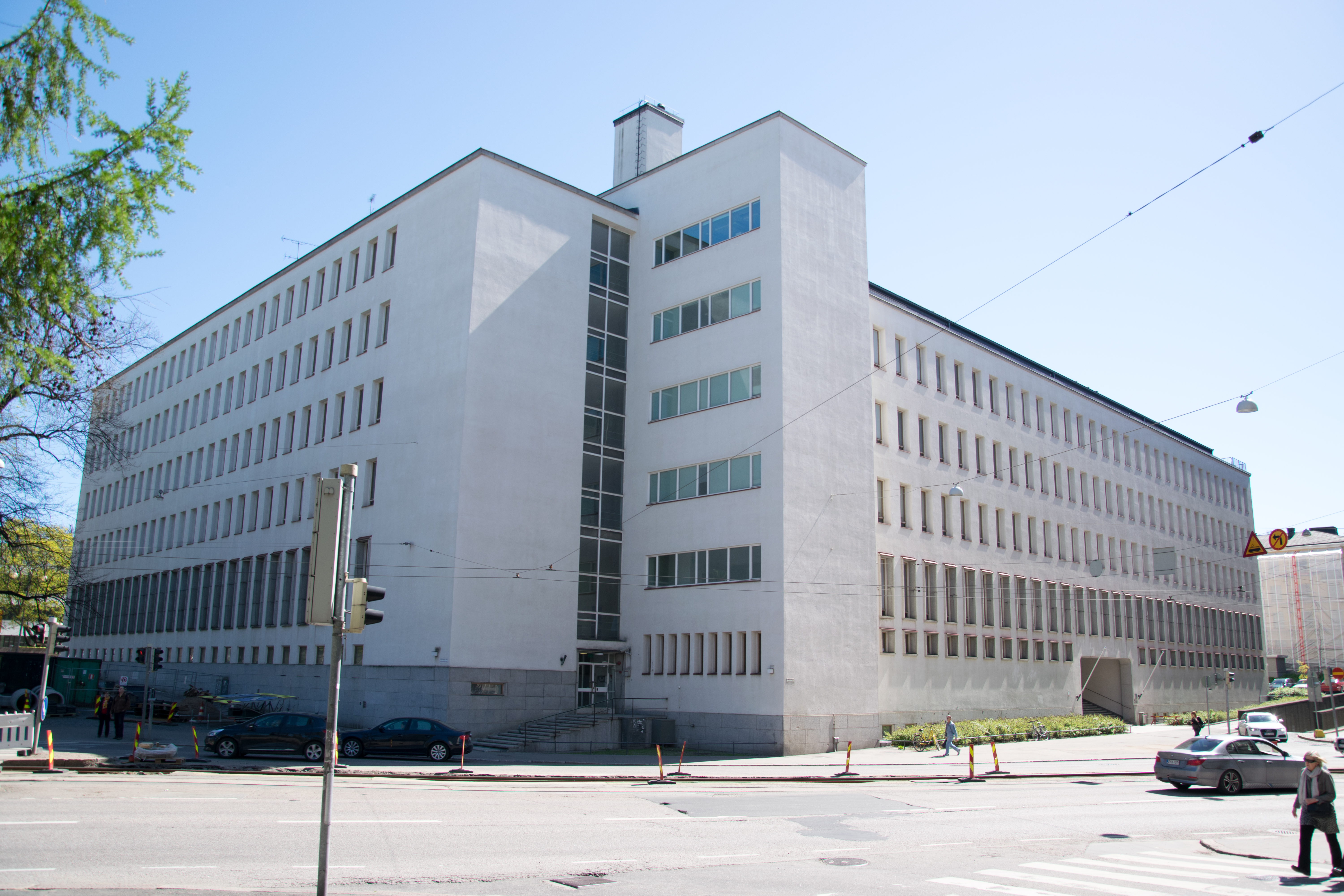 Fabianinkatu 37 - 39 Metsätalo